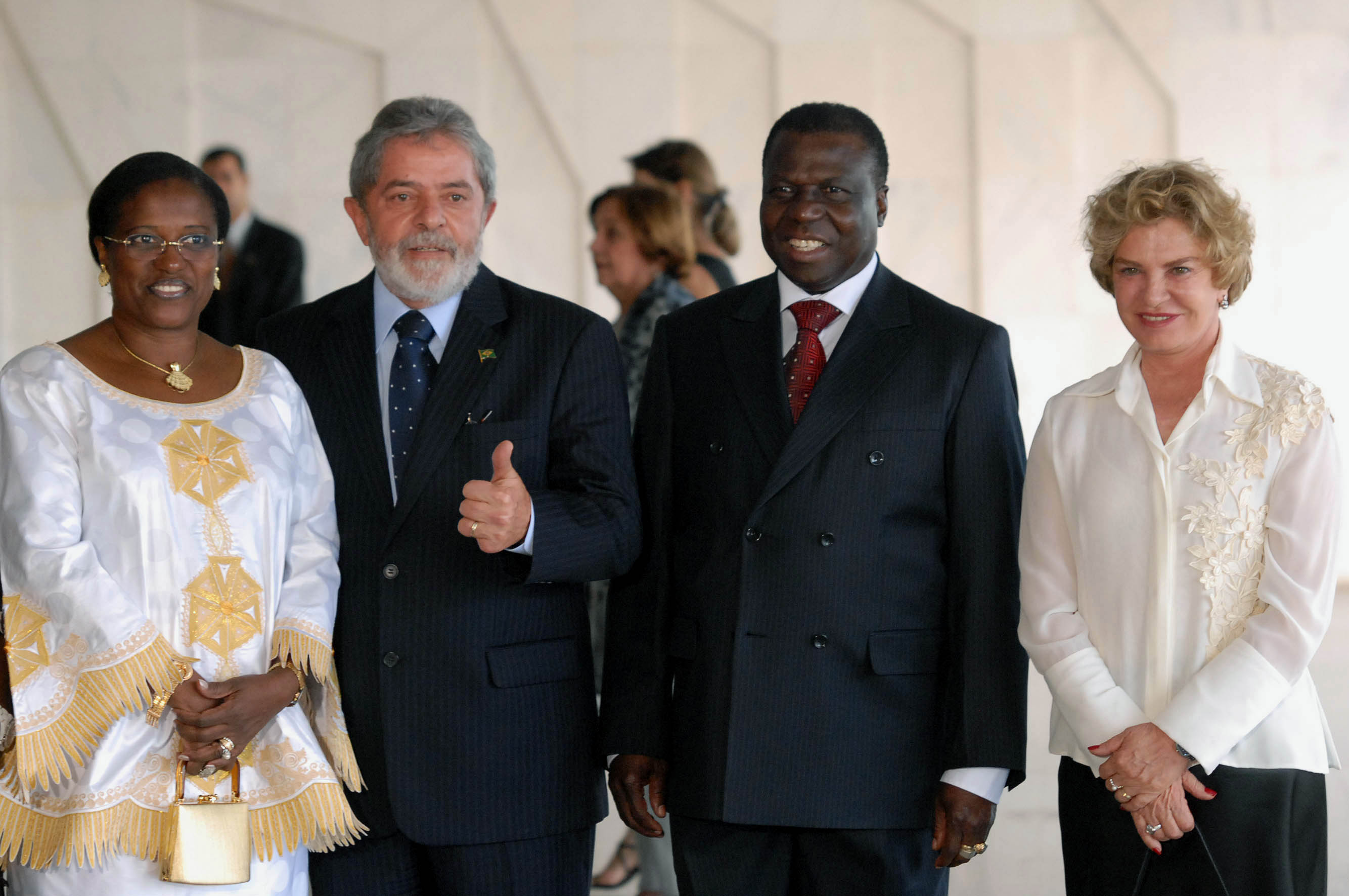 Lula da Silva, president of Brasil, João Bernardo Vieira, president of Guinea-Bissau, with Marisa Letícia Lula da Silva and Isabel Vieira during Vieiras visit to Brasil.